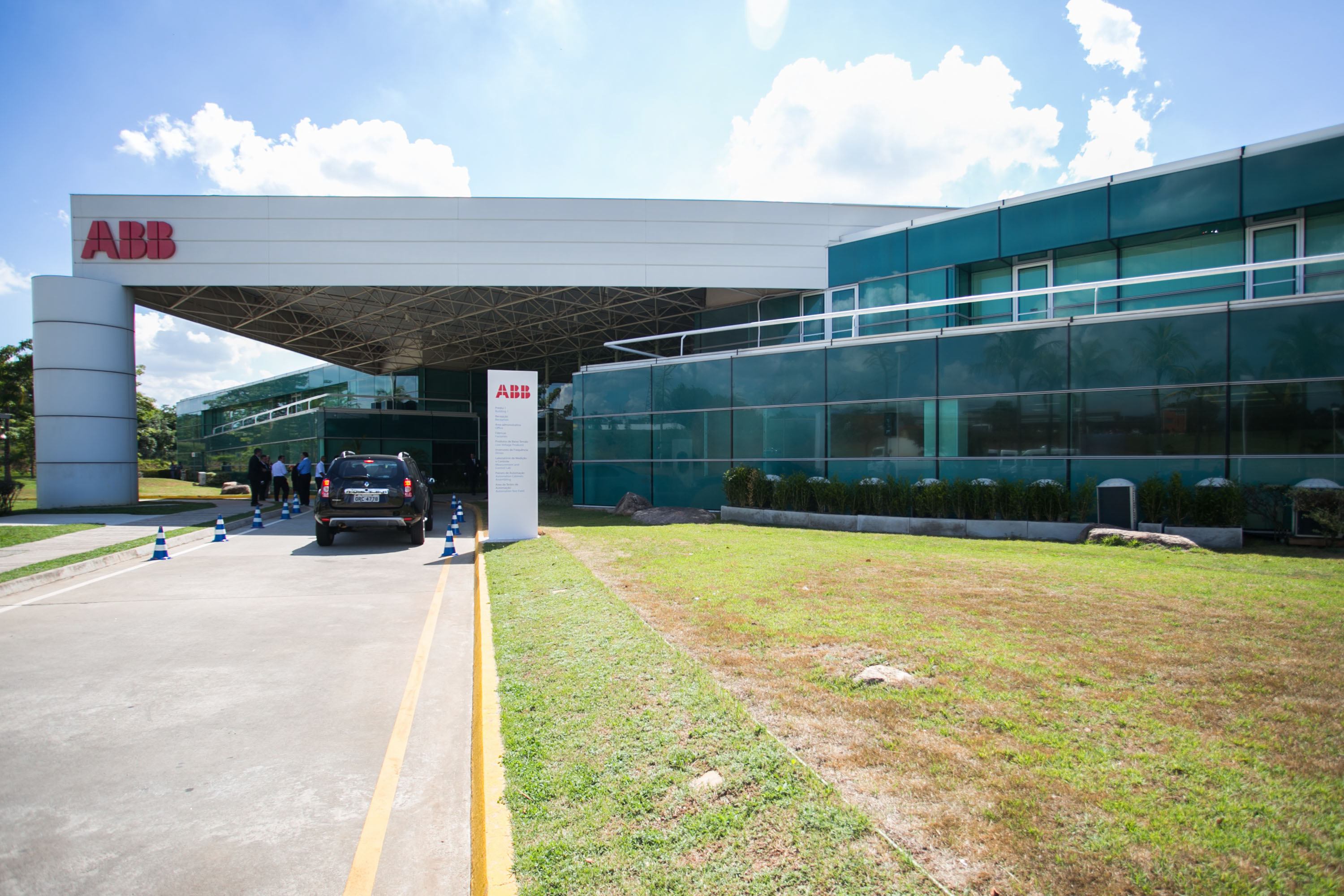 O governador Geraldo Alckmin durante inauguração da fábrica da ABB em Sorocaba. Data: 26/02/2014. Local: Sorocaba/SP.